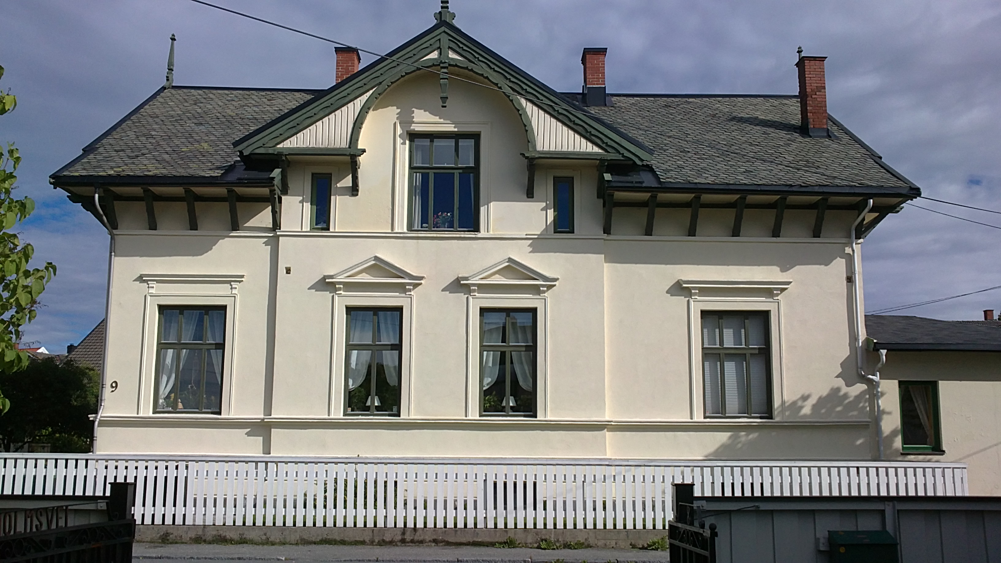 Bilde av Anne Holts barndomshjem